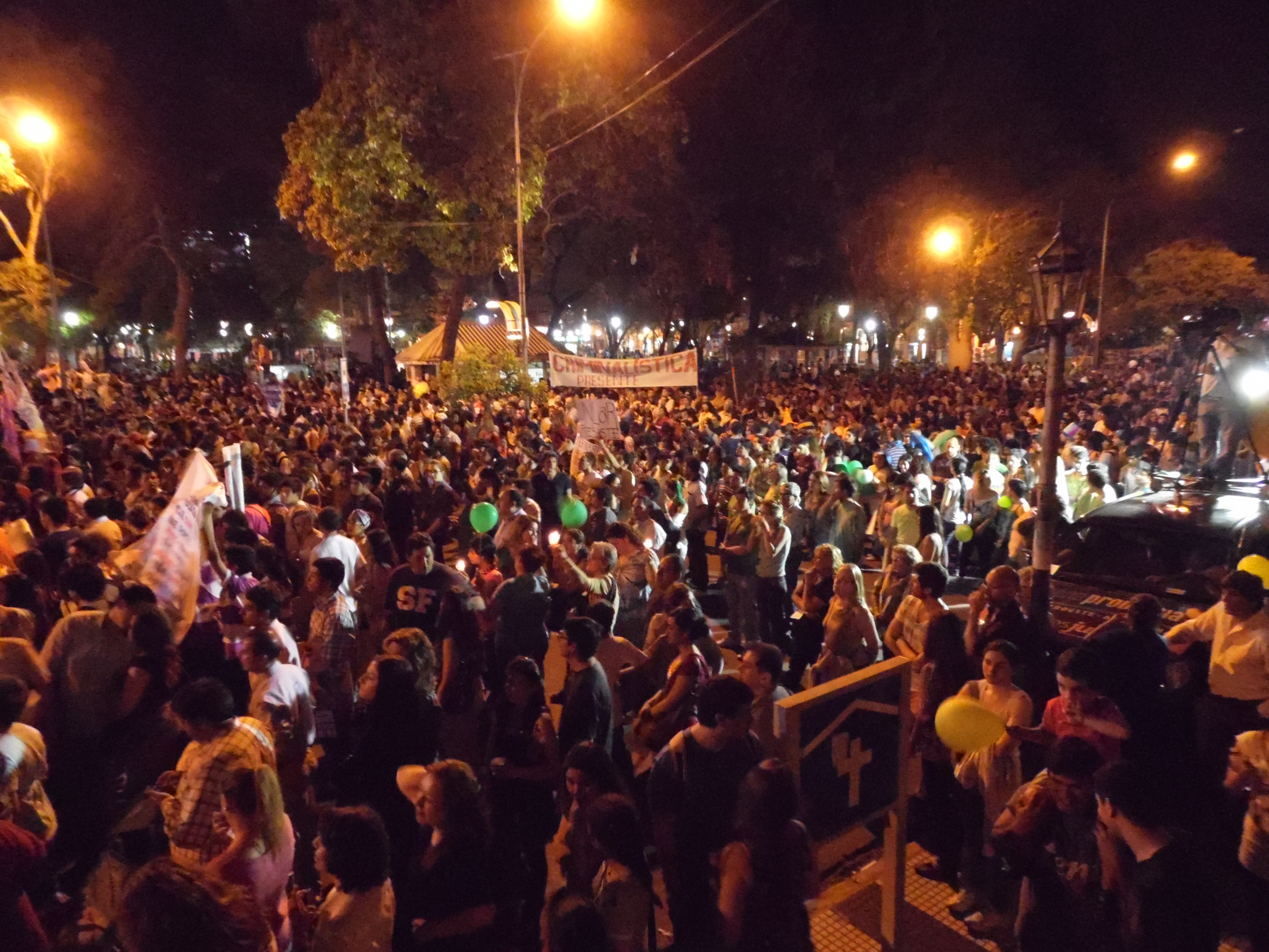 Marcha del 8-0 en Octubre - Plaza 25 de Mayo.